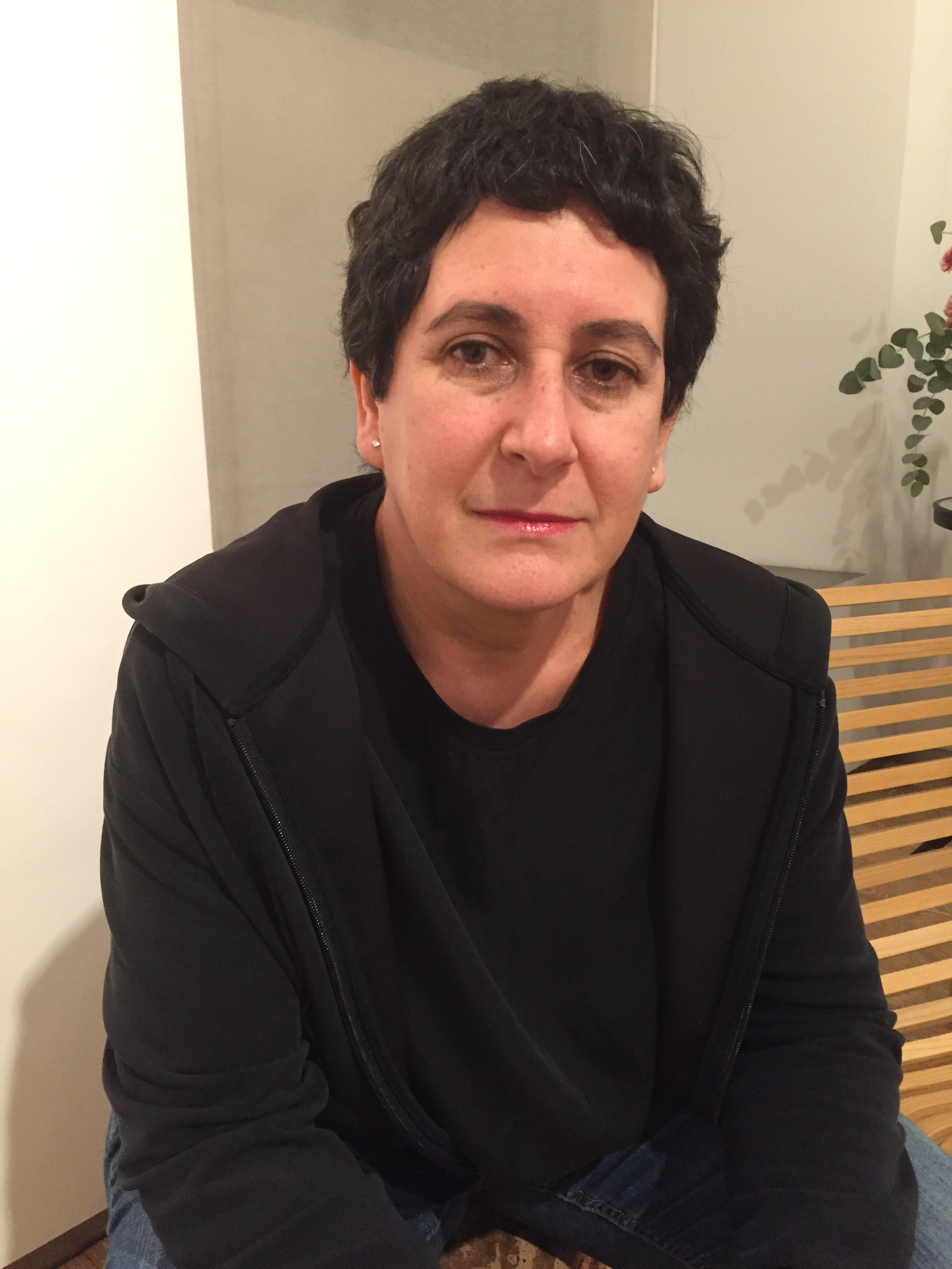 en la Inauguración de la exposición en el espacio de Rafael Ortiz de Madrid en 2019